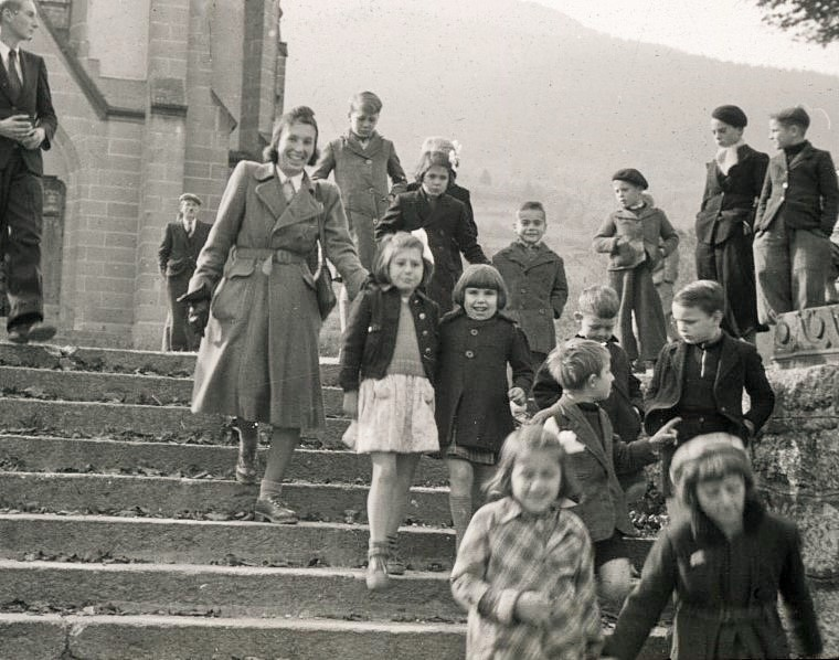 SRK Kinderheim St. Cergues, Frankreich